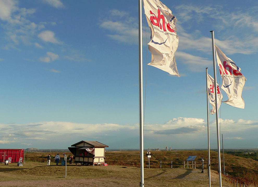 aha Fahnen auf dem Monte Müllo